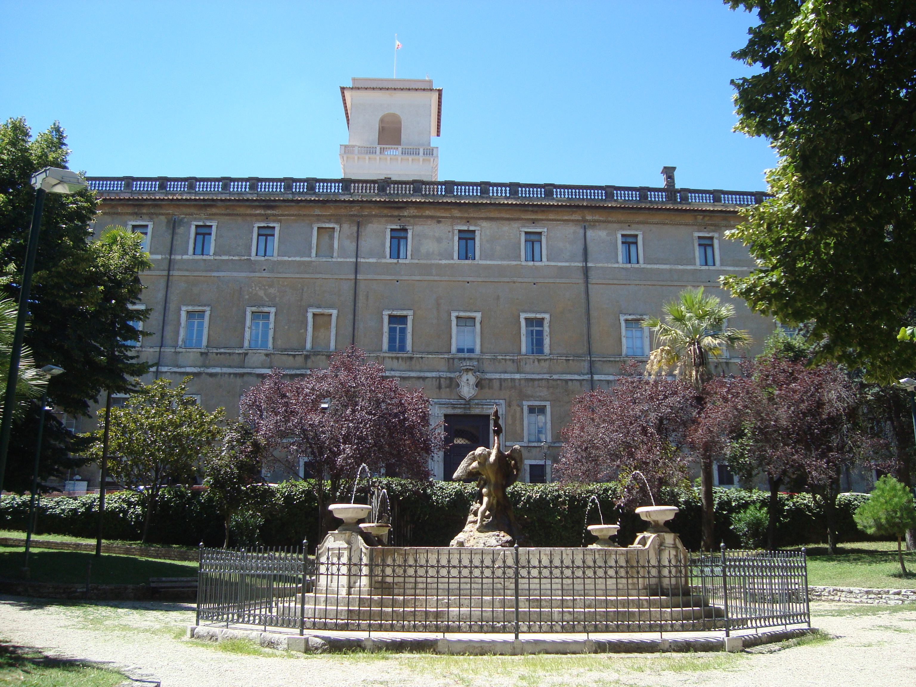 Le Palais Orsini de Monterotondo en Italie, siège de la mairie.